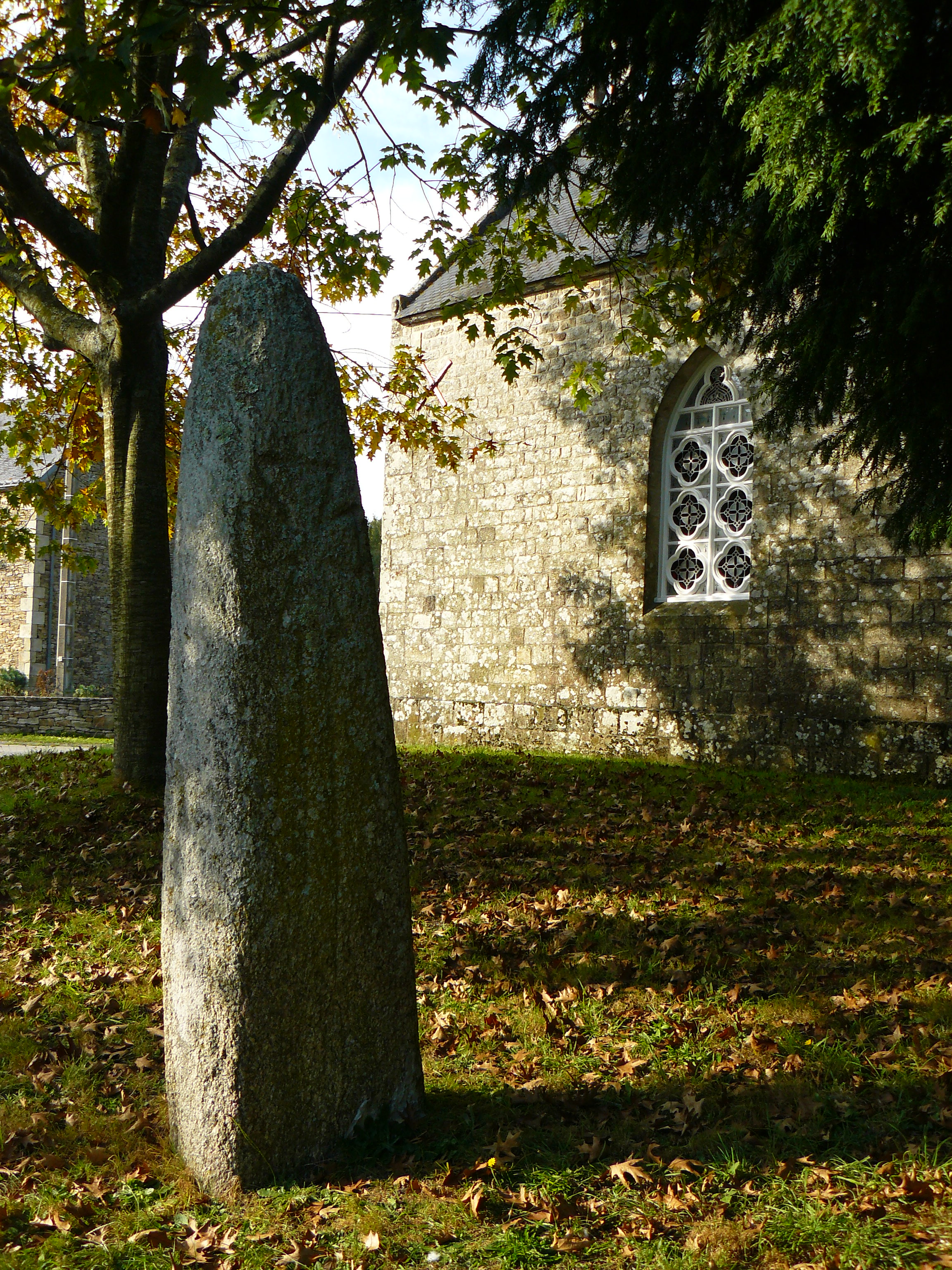 Stèle du moustoir située sur la commune de Saint Jean Brévelay 56 FRANCE. Il s'agit d'une stèle gravée d'une croix pouvant provenir d'un menhir.